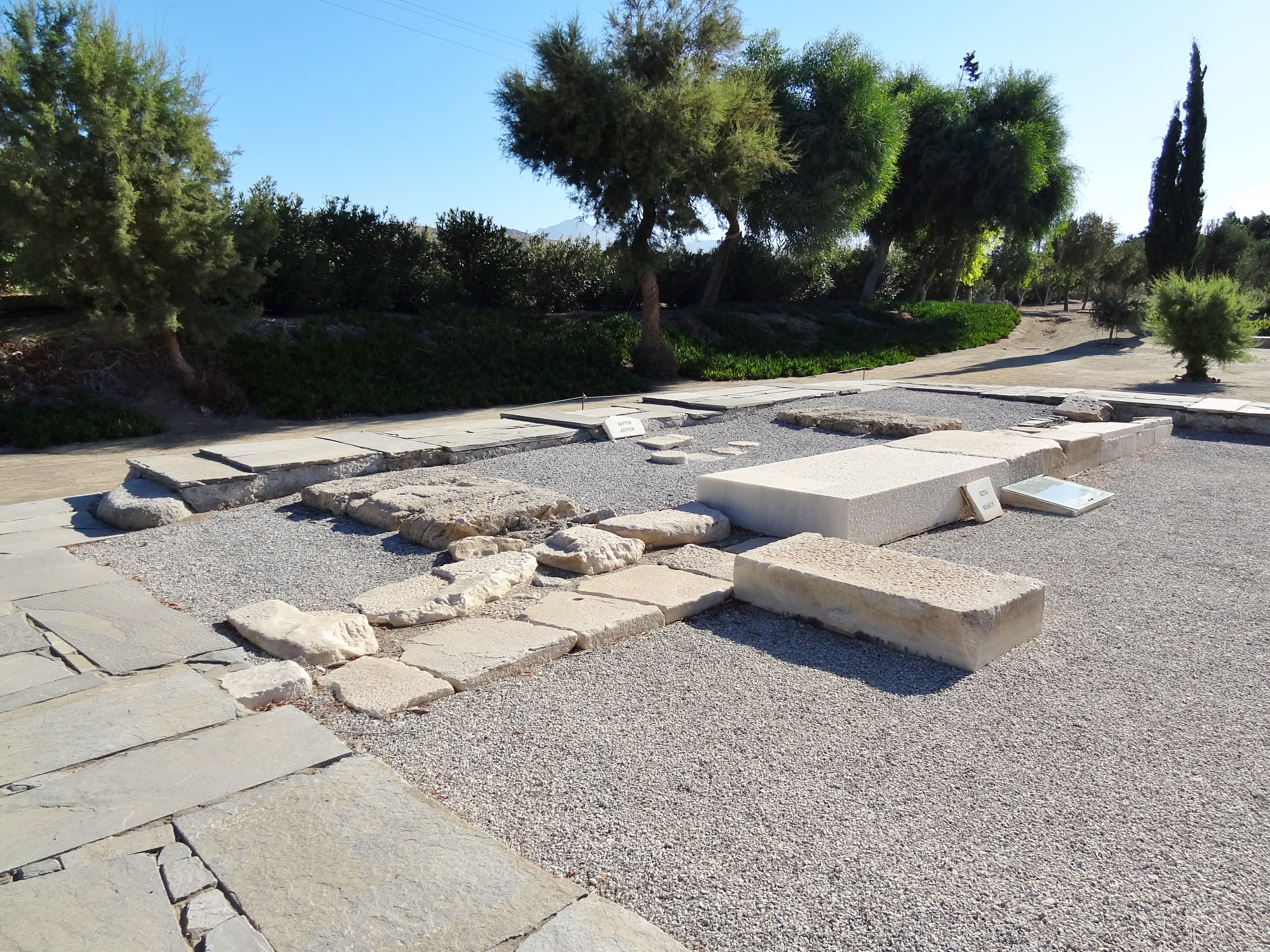 Adyton des Tempels des Dionysos von Yria auf Naxos, Kykladen, Griechenland